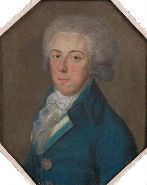 Князь Михаил Петрович Голицын (1764—1848)